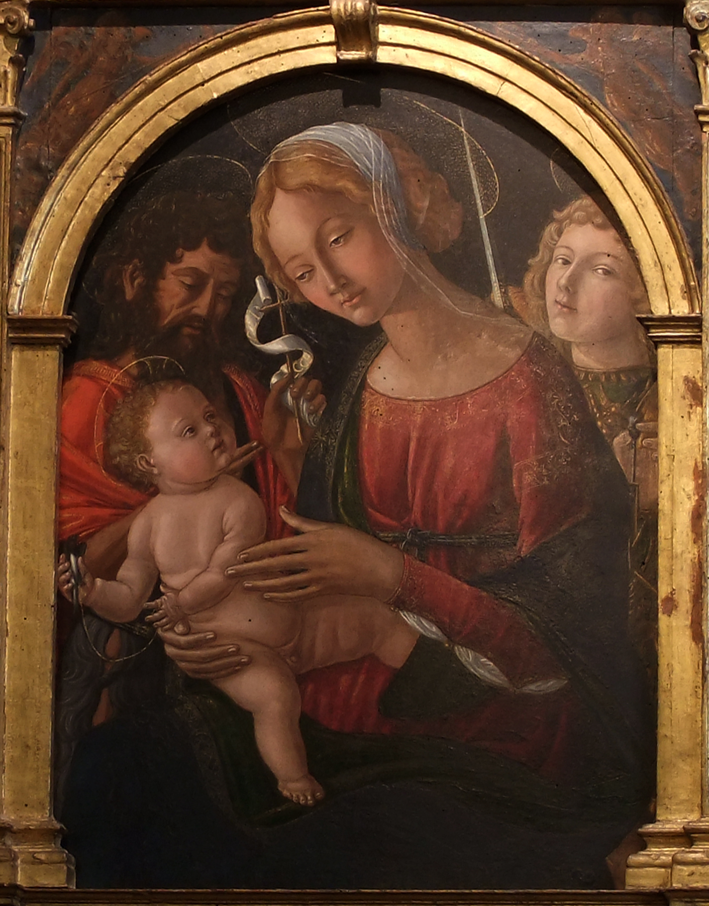 Neroccio di Bartolomeo de' Landii - Madonna col Bambino, San Giovanni Battista e San Michele Arcangelo